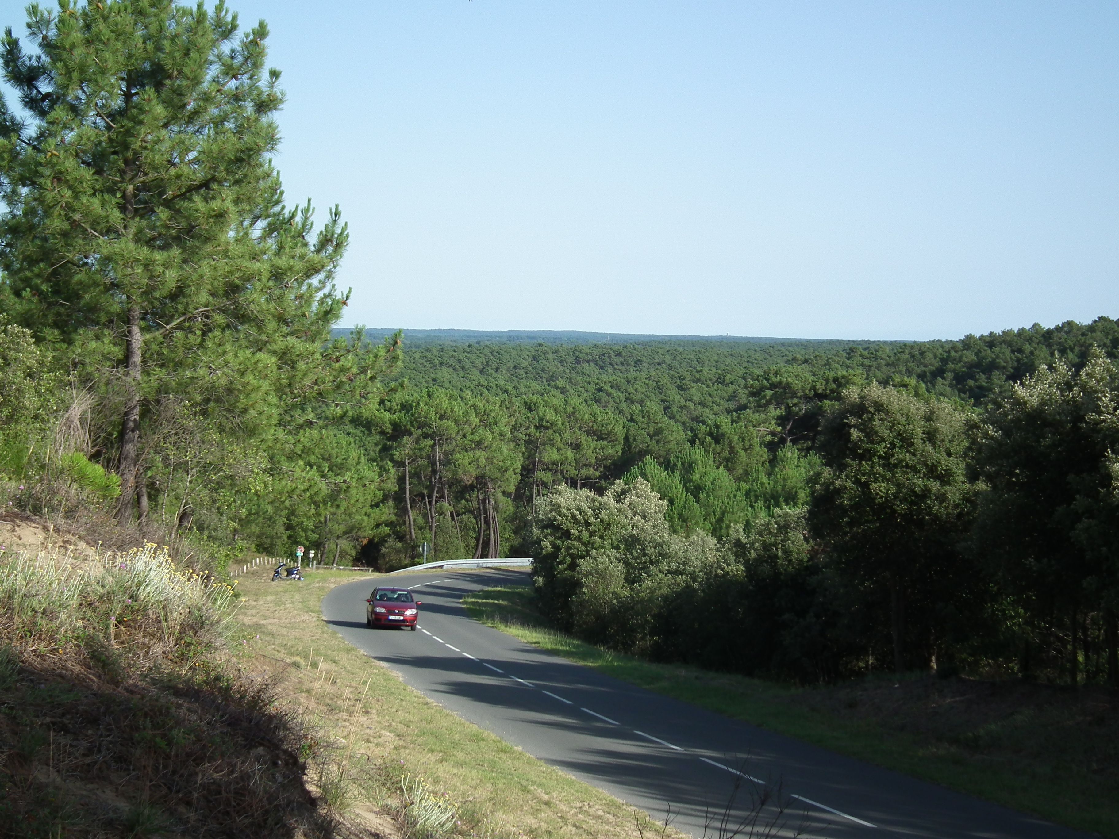 D25 près du Gardour